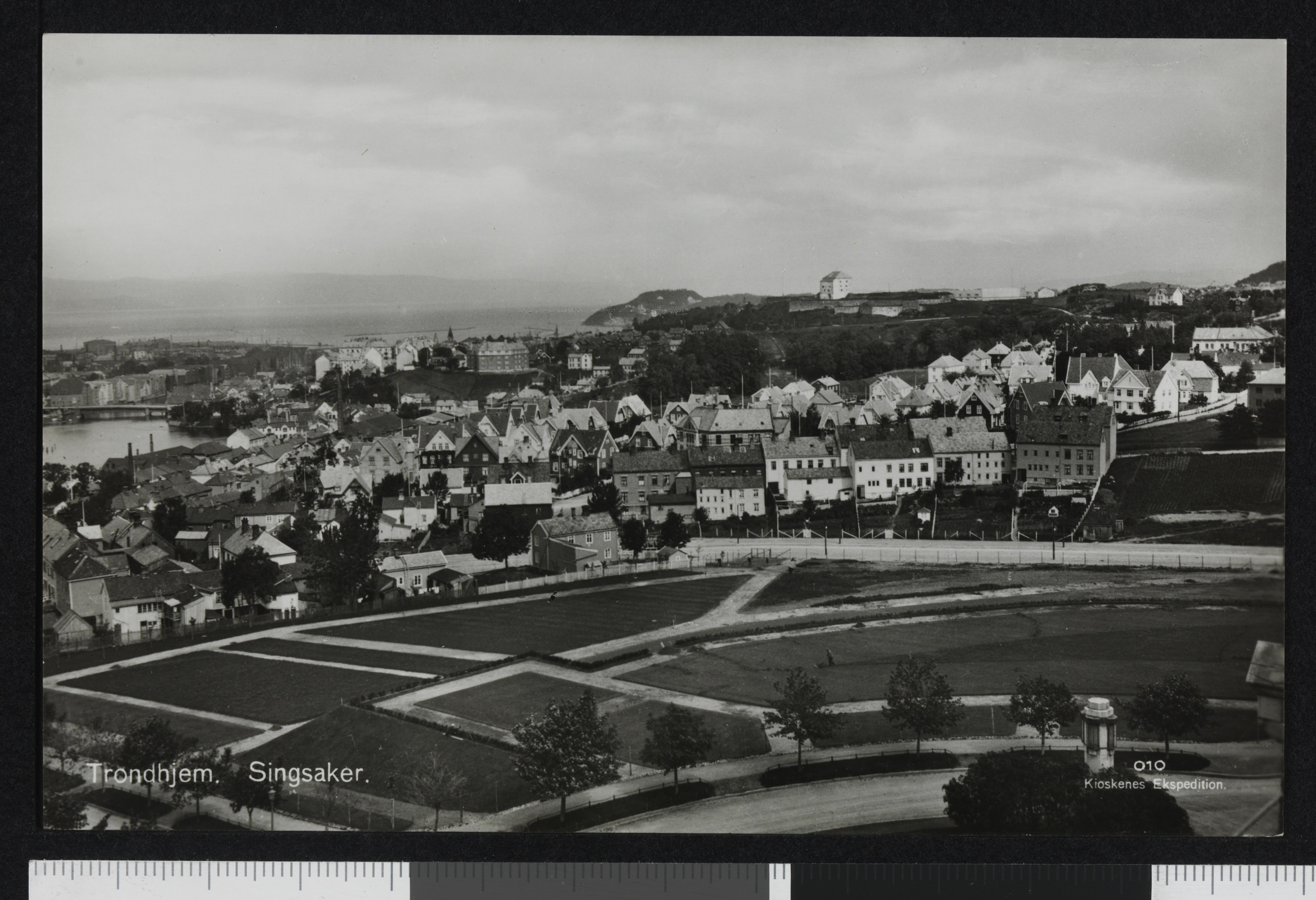 Bildet er hentet fra Nasjonalbibliotekets bildesamling Nedre Singsaker, Trondheim, Sør Trøndelag